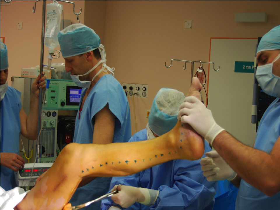 Operace dolní končetiny při kritické ischemii